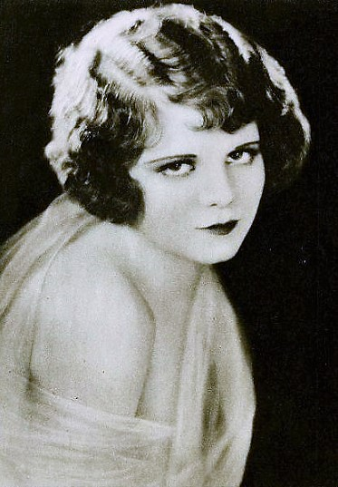 Vera Reynolds